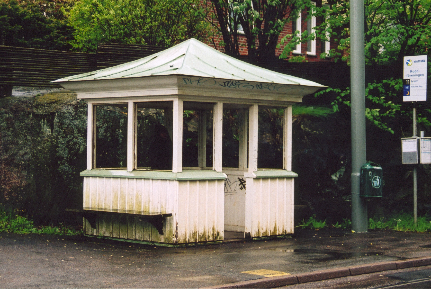 Väntkur i trä vid Roddföreningens spårvagnshållplats i Göteborg. Vaiting house in wood at Roddföreningen tram stop in Göteborg, Sweden.